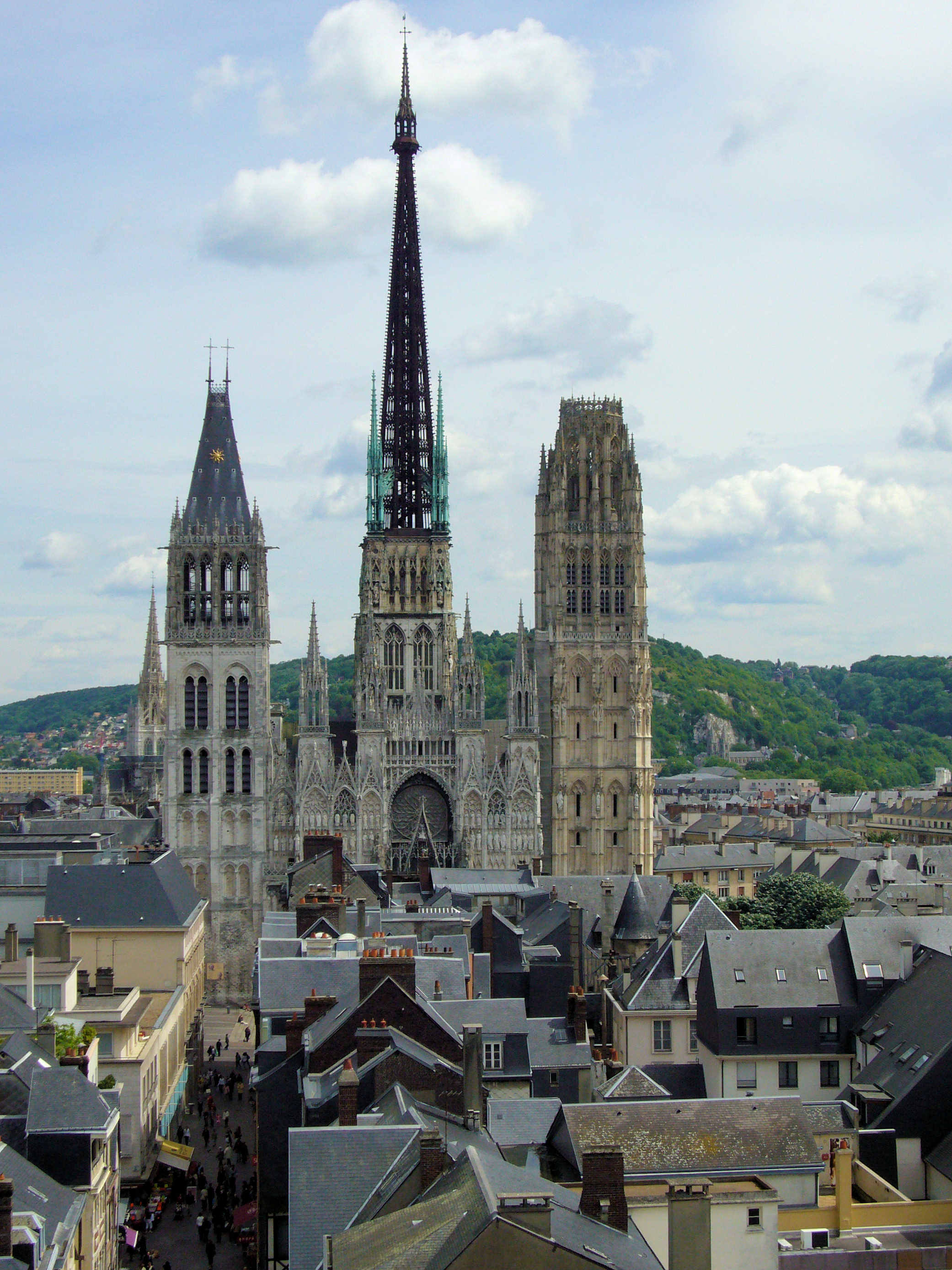 cathédrale de rouen vue du gros horloge